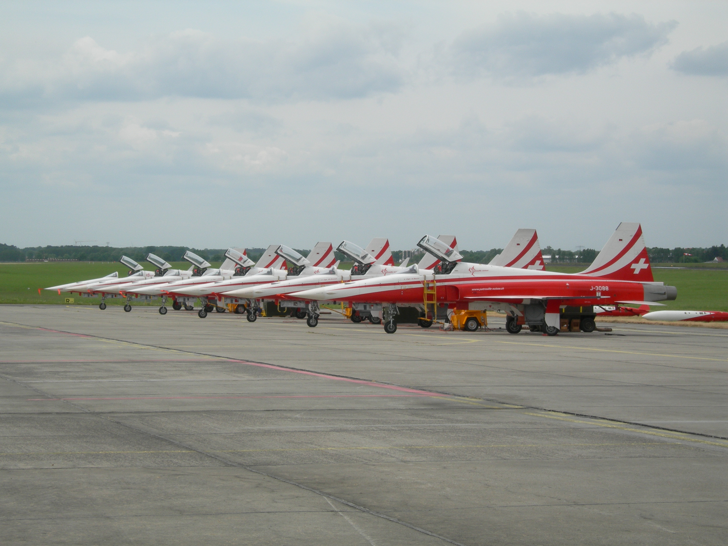 ILA 2006